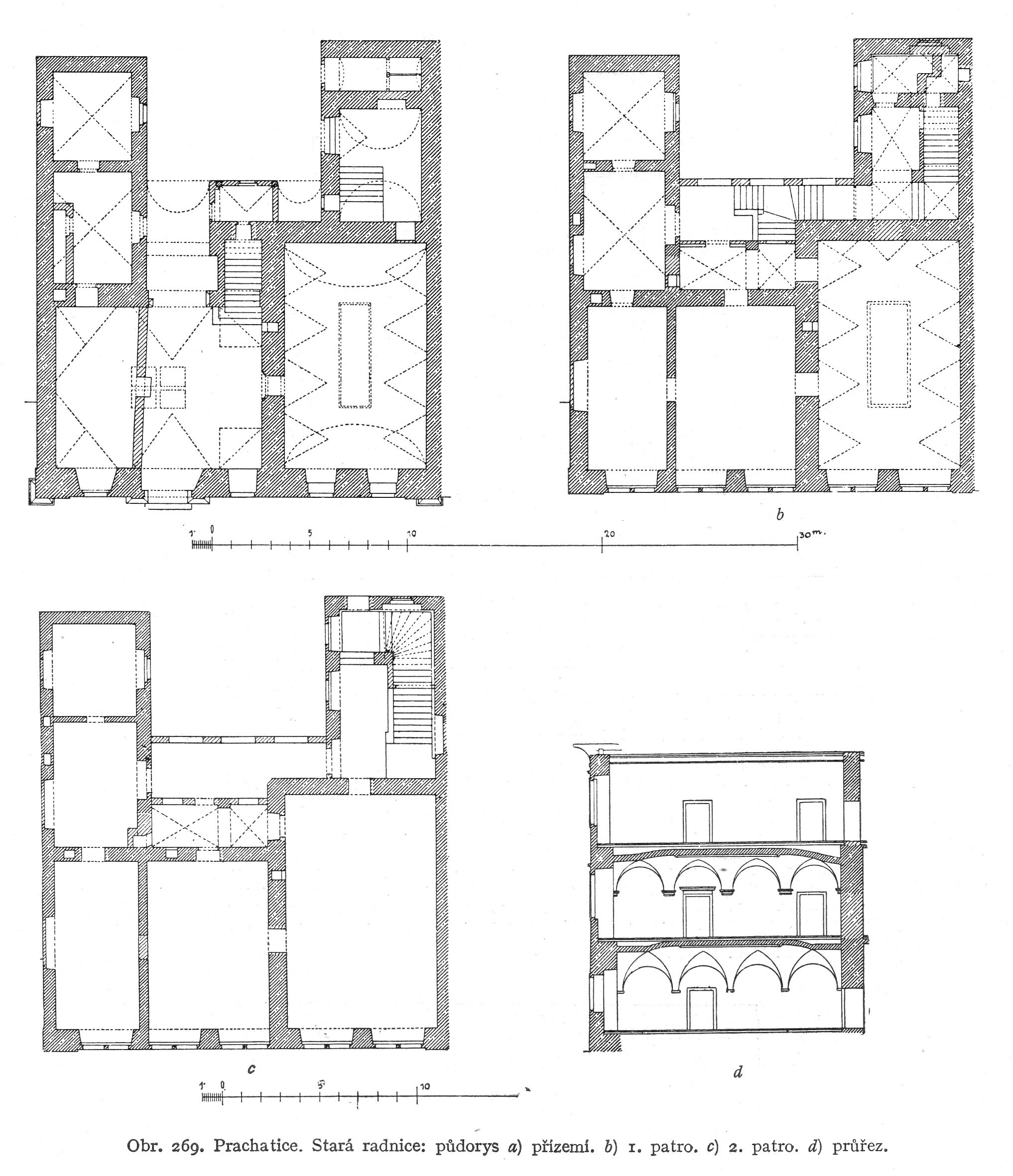 Prachatice. Stará radnice: a) přízemí. b) 1. patro. c) 2. patro. d) průřez.